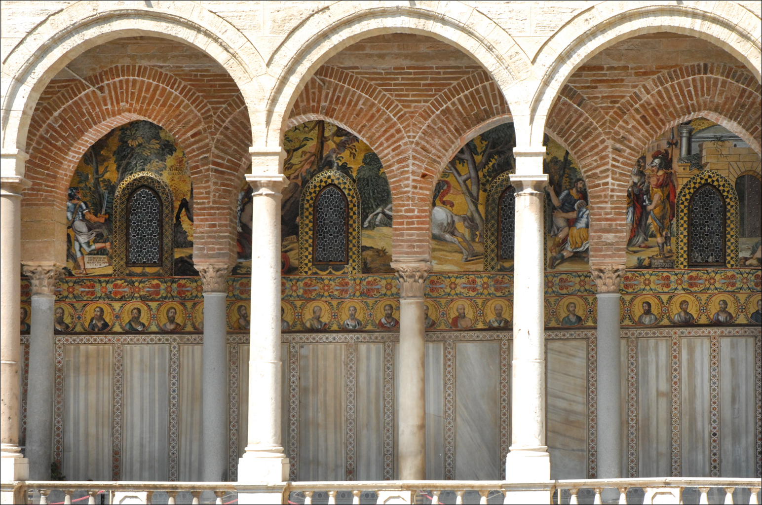 L'entrée de la chapelle palatine dans la cour du palais des Normands L'intérieur de la chapelle date de la fin de la décennie 1130, jusque dans les années 1150-1160 mais le décor extérieur, visible sur la photo date lui du 19ème siècle. Au cours du temps, la chapelle a été englobée dans les bâtiments. Au Xe siècle, la Sicile est rattachée au califat fatimide du Caire. L’île reste sous domination musulmane jusqu’à l’arrivée des Normands, qui, en 1059, obtiennent la souveraineté des mains de la Papauté décidée à rechristianiser des territoires que Byzance n’était plus capable de reconquérir. La conquête normande s’échelonne entre 1060 à 1090. Finalement, en 1130, Roger II (1130-1154) obtient la couronne de l’antipape Anaclet II (1130-1138) et rassemble les territoires normands en un royaume, choisissant naturellement Palerme comme capitale. Il y fait construire un palais et, dans celui-ci, un riche édifice cultuel, la Chapelle palatine, qui, par son architecture et son décor, demeure un exemple exceptionnel de métissage des arts chrétiens d’Orient et d’Occident, et d’art islamique. Article de Qantara sur la chapelle palatine Article de Wikipedia sur le palais des Rois Normands